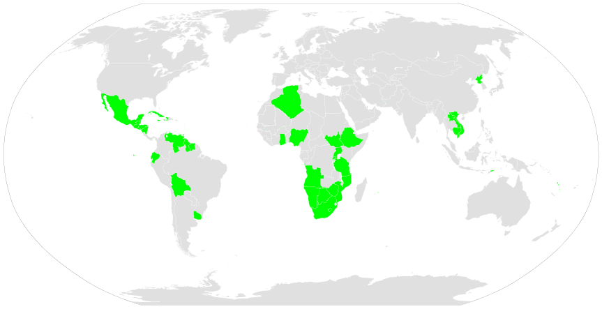 reconnaisance de la rasd